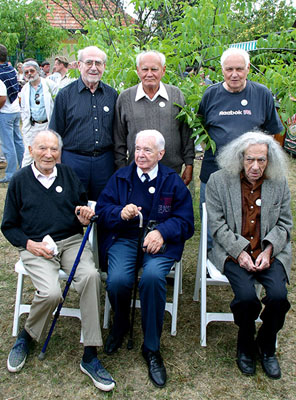 A Szárszói Találkozó "ifjai" - Ülnek: Fejtő Ferenc, Kosáry Domokos, Faludy György. Állnak: Méray Tibor, Göncz Árpád, Jancsó Miklós - Szárszói Találkozó 2003